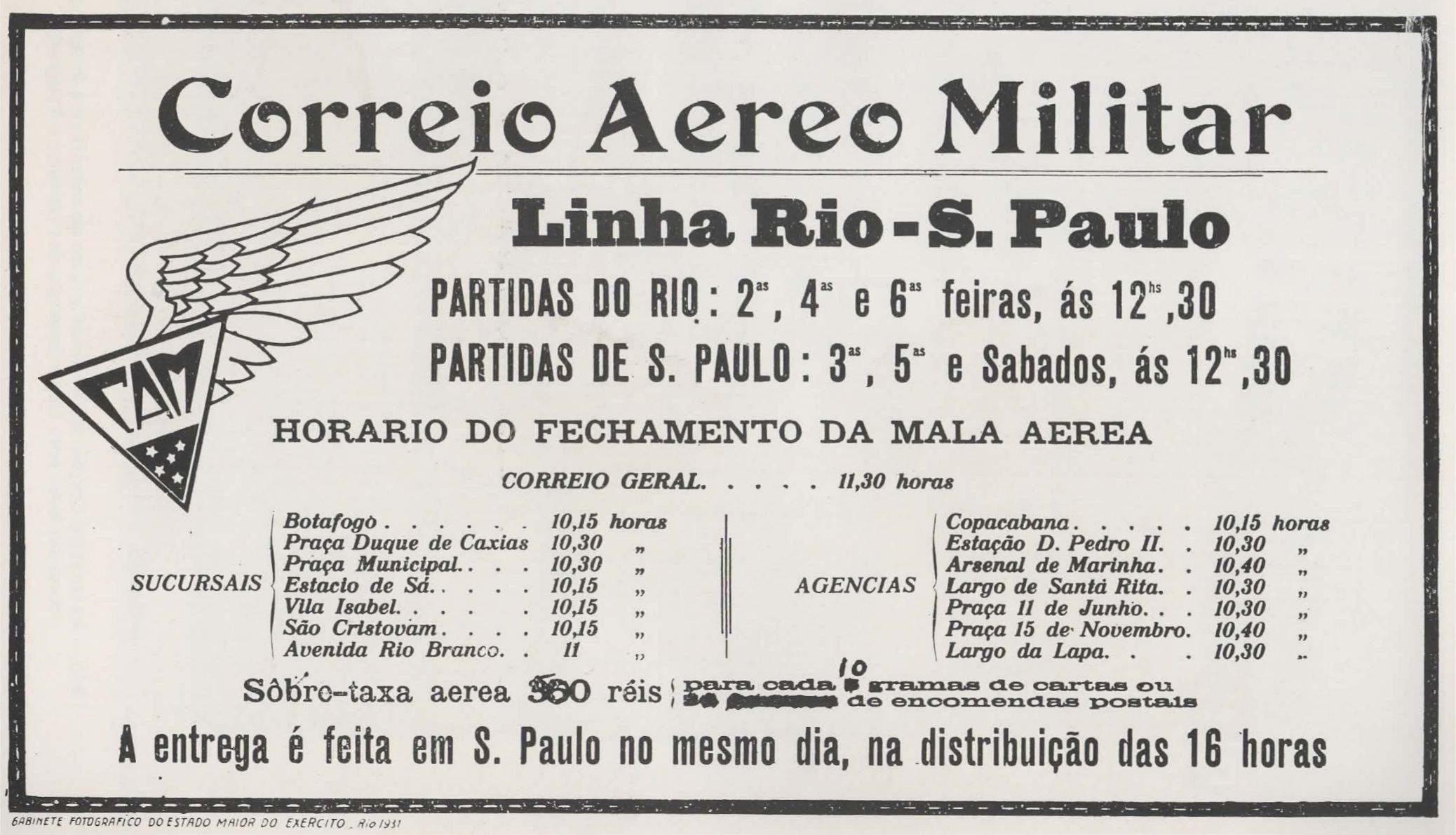 Mídia dos anos 1930 do Governo do Brasil/Ministério da Guerra informando rotas do então Correio Aéreo Militar do Brasil.